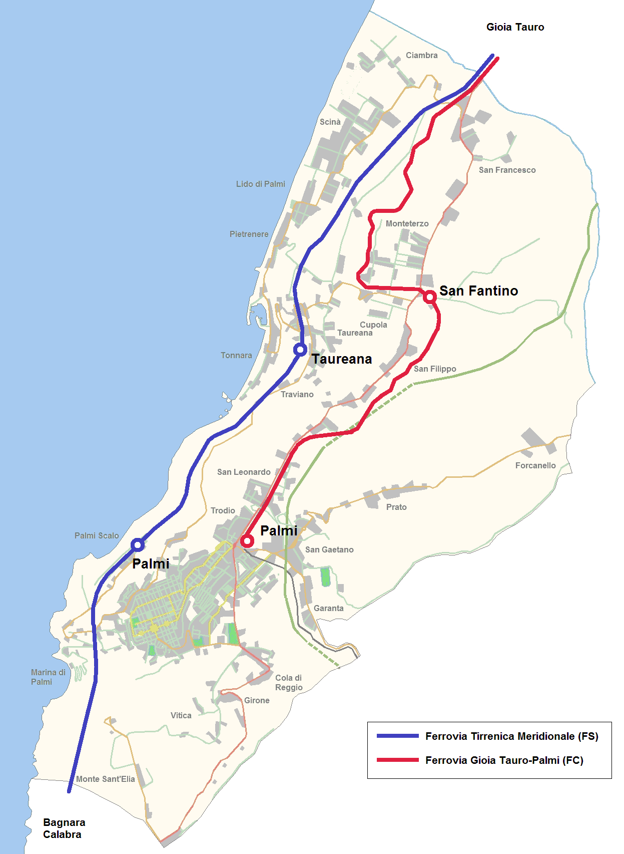 Mappa delle linee ferroviarie del territorio comunale di Palmi